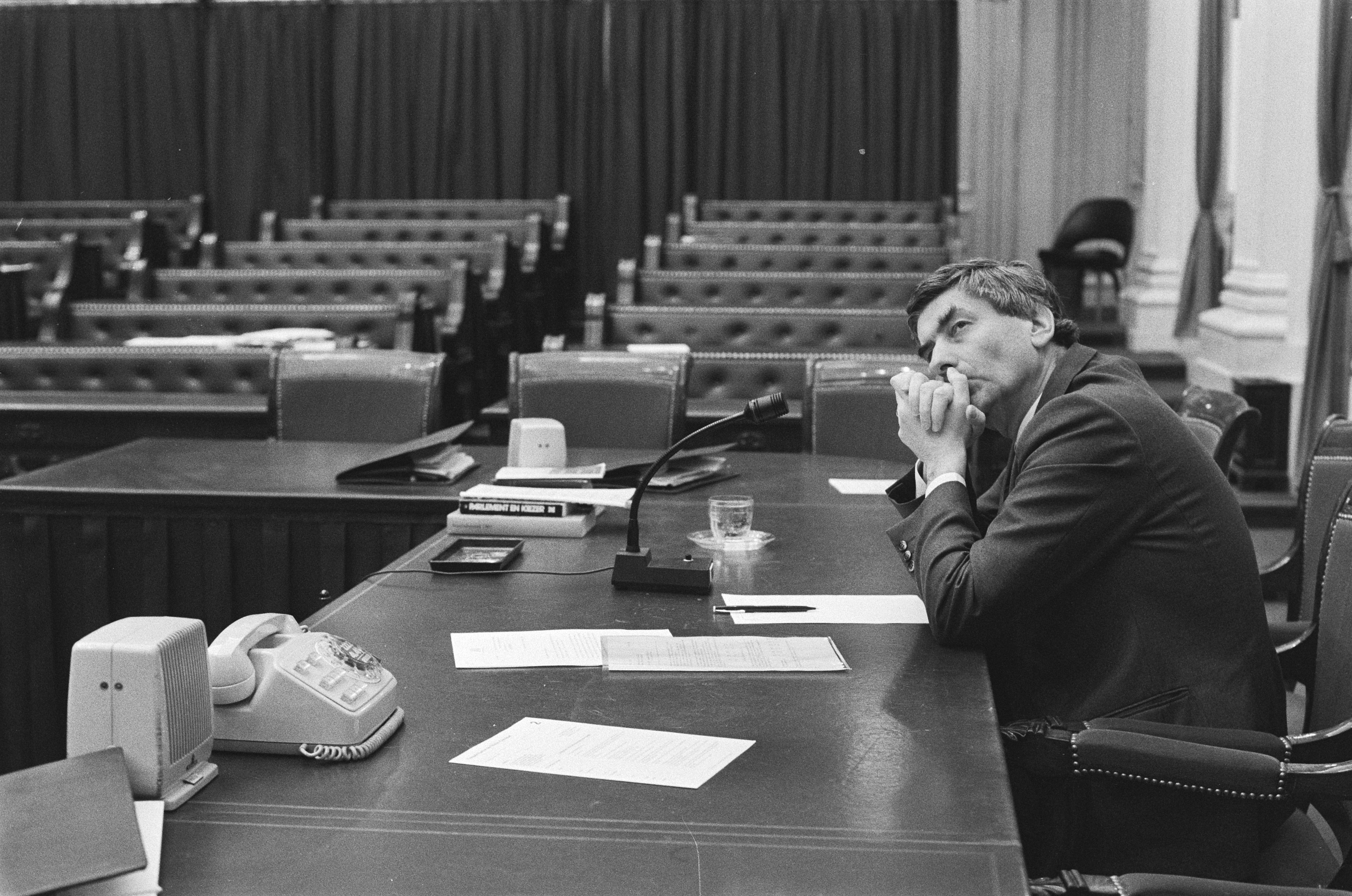 Collectie / Archief : Fotocollectie Anefo Reportage / Serie : Premier Lubbers tijdens het aardgasdebat Datum : 1 maart 1986 Locatie : Den Haag, Zuid-Holland Trefwoorden : ministers-presidenten, parlementaire debatten, politiek Persoonsnaam : Lubbers, Ruud Fotograaf : Croes, Rob C. / Anefo, [onbekend] Auteursrechthebbende : Nationaal Archief Materiaalsoort : Negatief (zwart/wit) Nummer archiefinventaris : bekijk toegang 2.24.01.05 Bestanddeelnummer : 933-5875